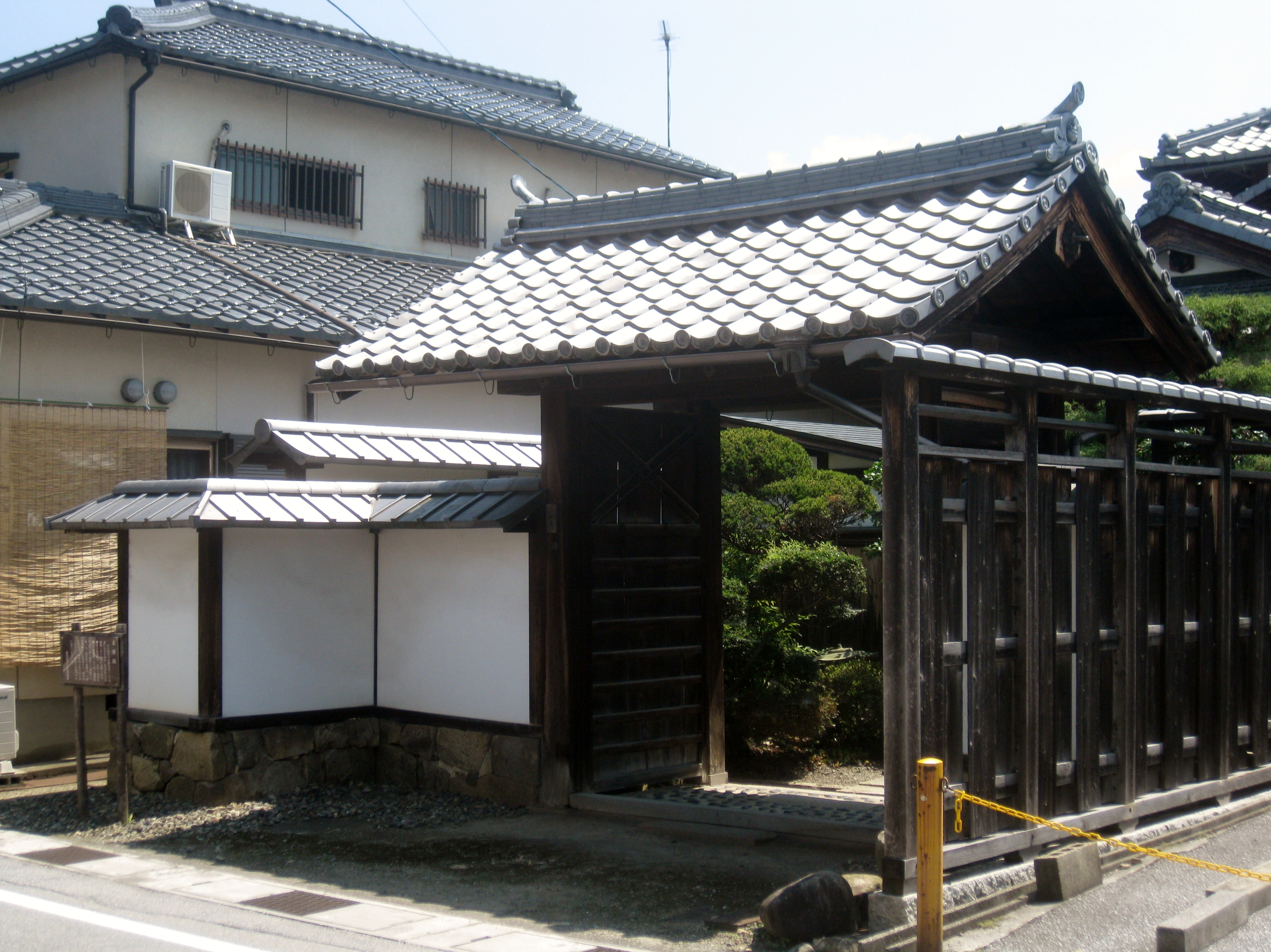 中山道高宮宿本陣跡。門が現存している。